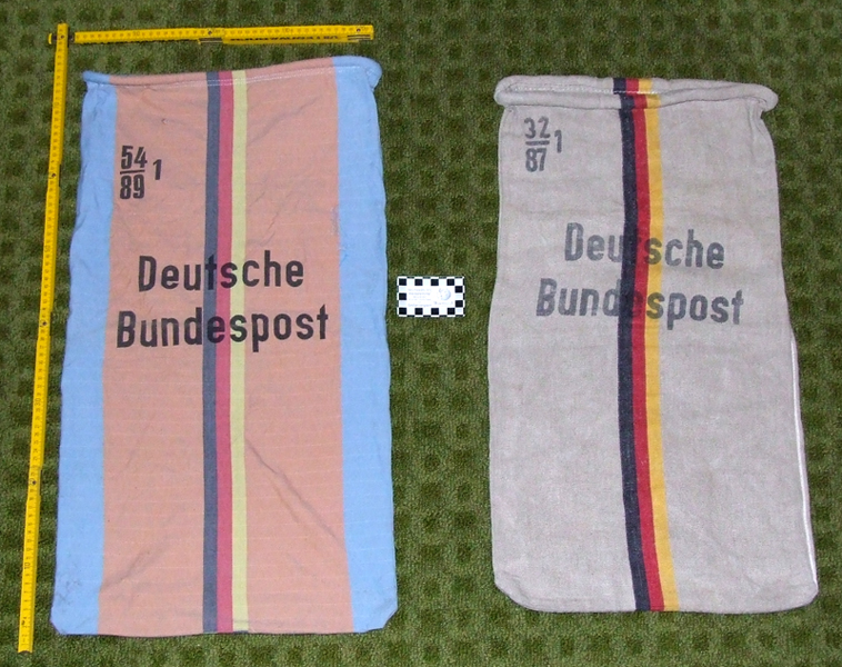 Postbeutel der Deutschen Bundespost. links: Luftpostbeutel in blau-rosa, rechts: normaler braungrauer Postbeutel. Auf dem grünen Untergrund ist zusätzlich auf der linken Bildhälfte ein gelber Gliedermaßstab und zwischen den beiden Beuteln befindet sich eine Größenvergleichskarte (Vergleiche Original hier)